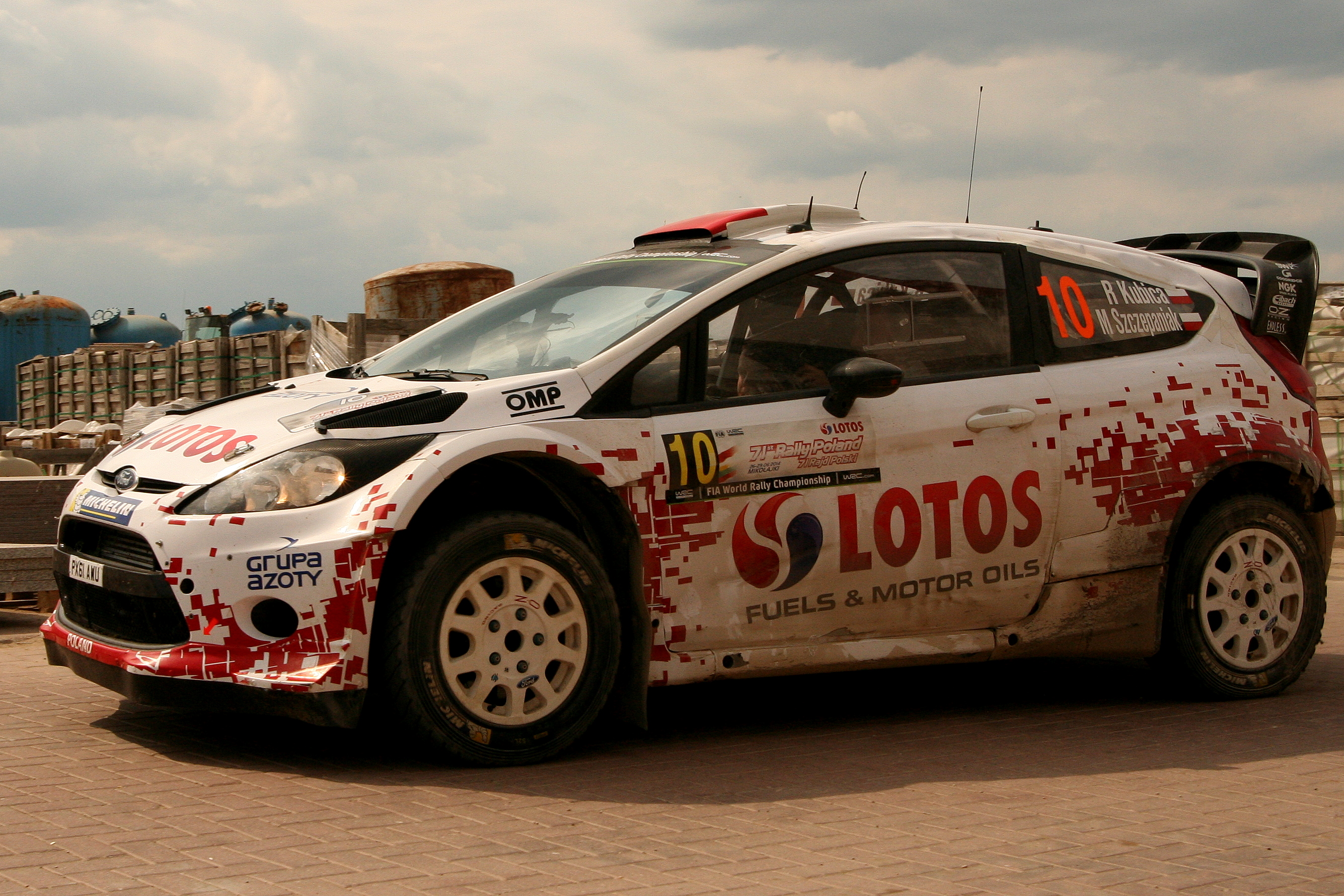 Robert Kubica po powrocie z 15 OS Rajdu Polski 2014